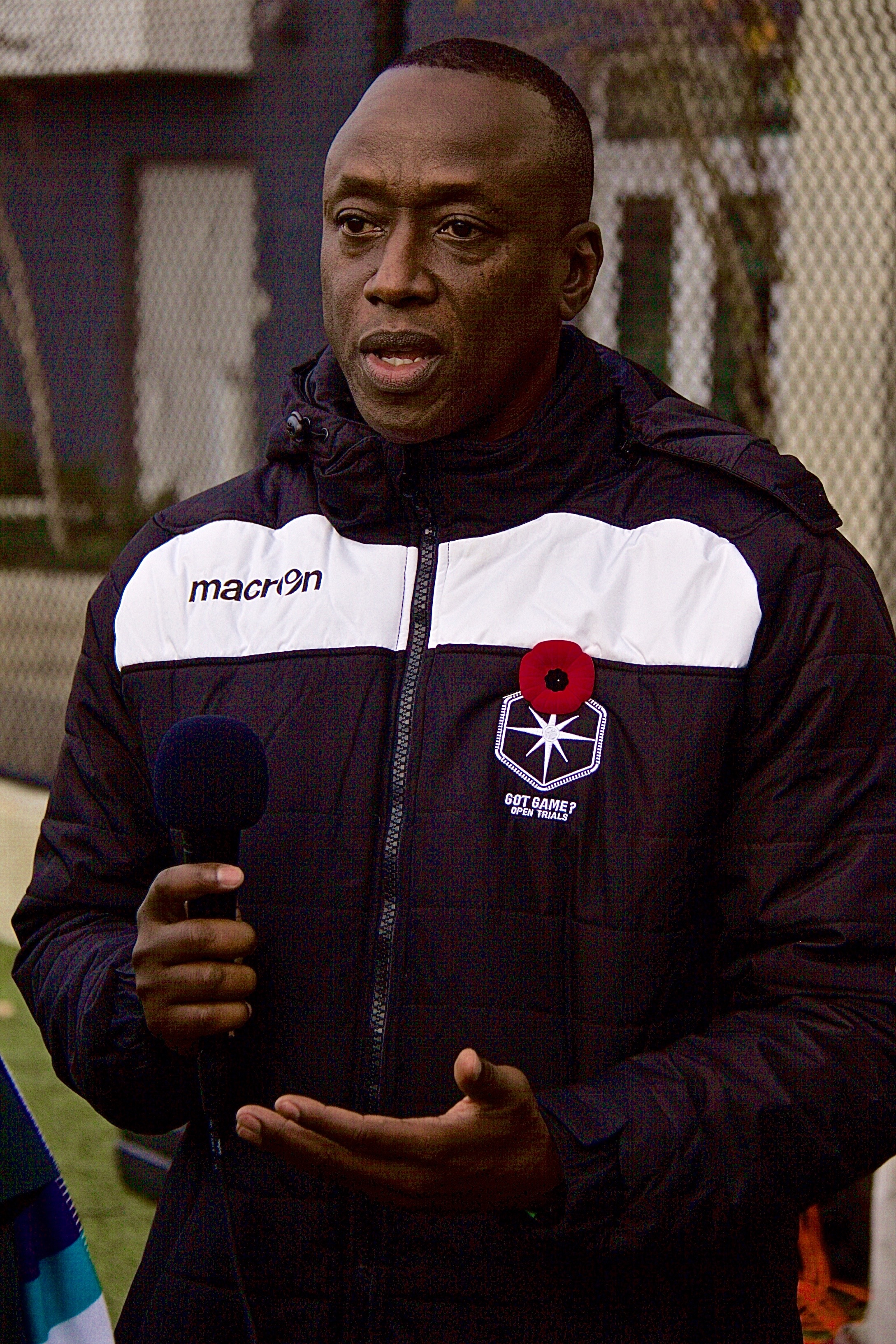 Alexander Bunbury, ancien footballeur canadien, en tant que l‘entraîneur du camps d'essai publique «GotGame» de la Première ligue canadienne.